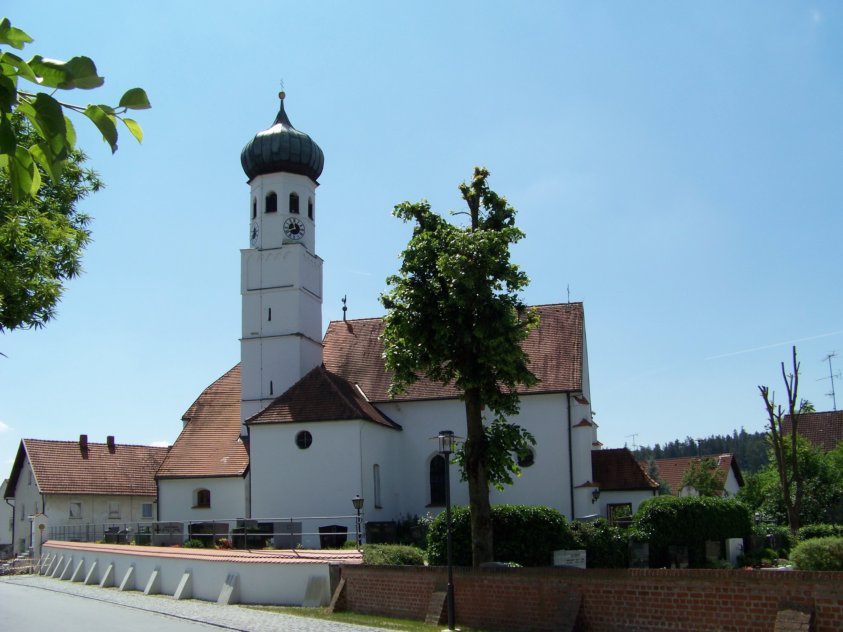 Altdorf bei Landshut. Pfettrach, Pfeffenhausener Straße 21. Katholische Filialkirche St. Othmar, Tor und Seelenhaus. Saalkirche mit eingezogenem Chor, um 1500. Barockisiert. Gliederung durch Strebepfeiler am Langhaus. Am Chor Dachfries und Dreieckslisenen. Nordseitig Chorflankenturm, mit Geschossgliederung und Blendbögen. Achtseitiger Aufsatz und Zwiebelkuppel barock.